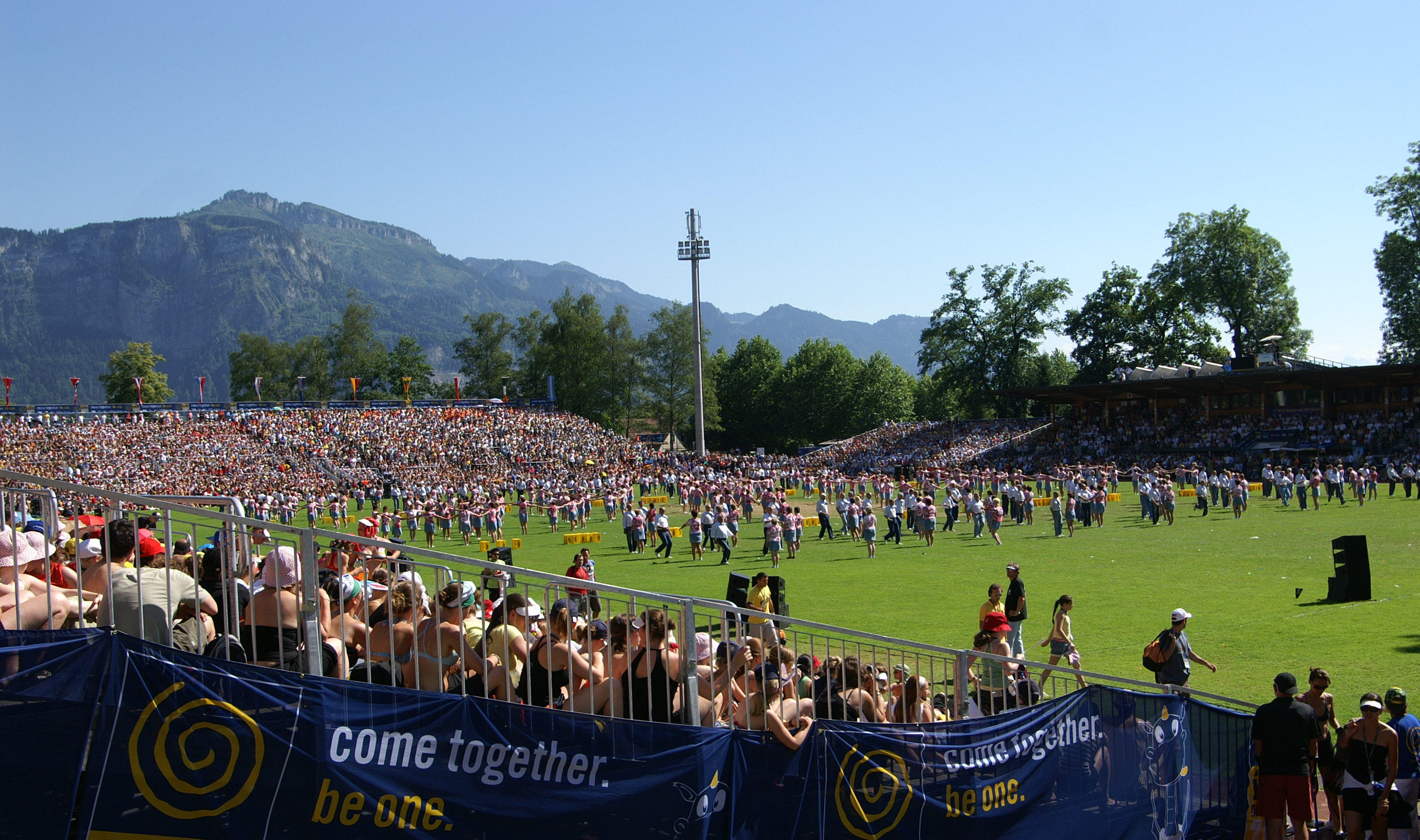 Dornbirn, Abschlussfeier der Weltgymnaetrada 2007 im Stadion „Birkenwiese“. Nation ?????????? Hilfe